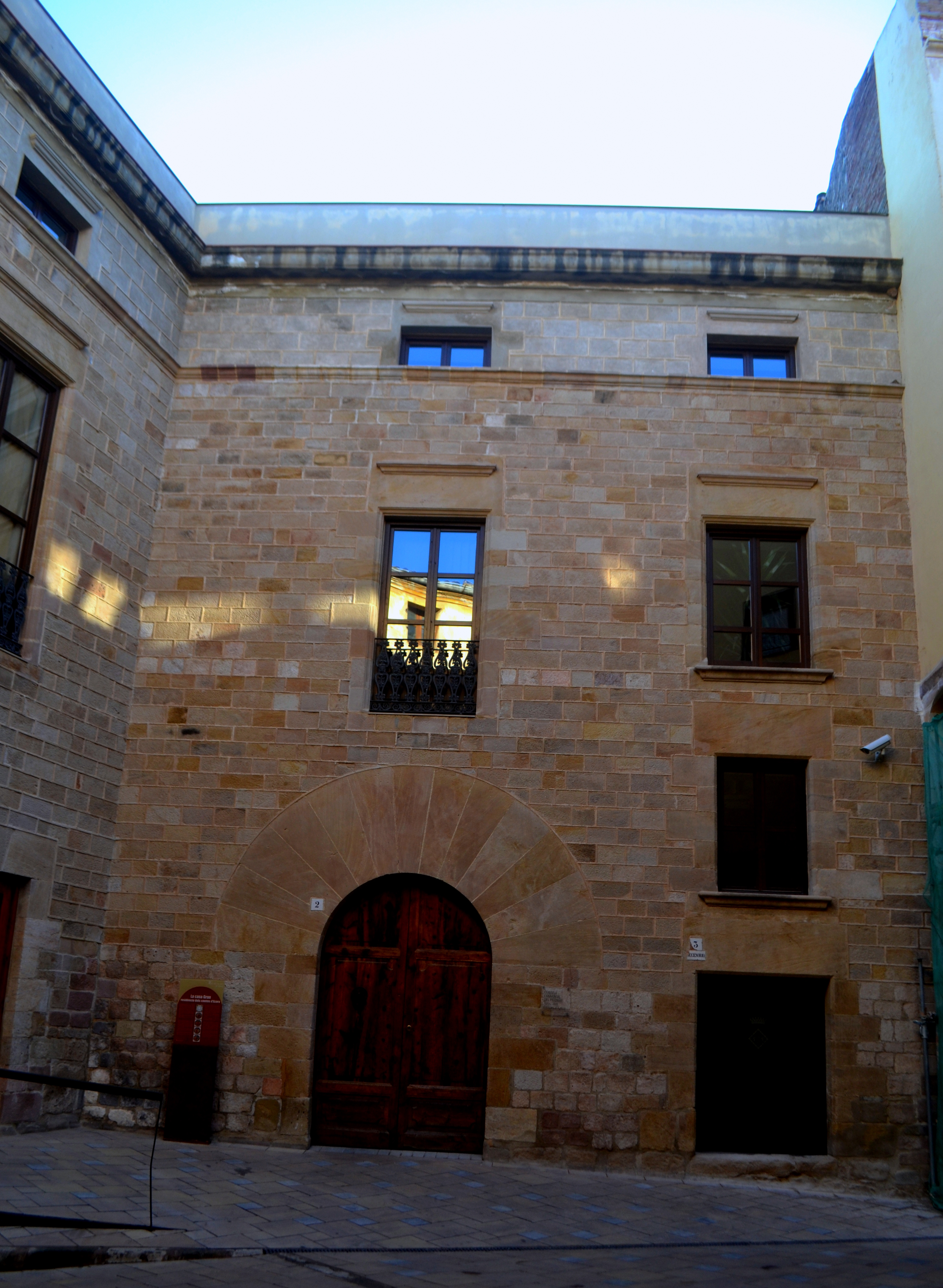 Museu Comarcal (Falset)